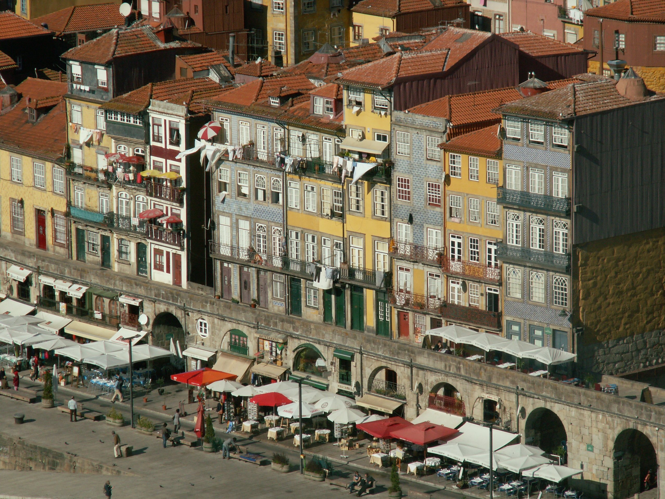 Caid da Ribeira